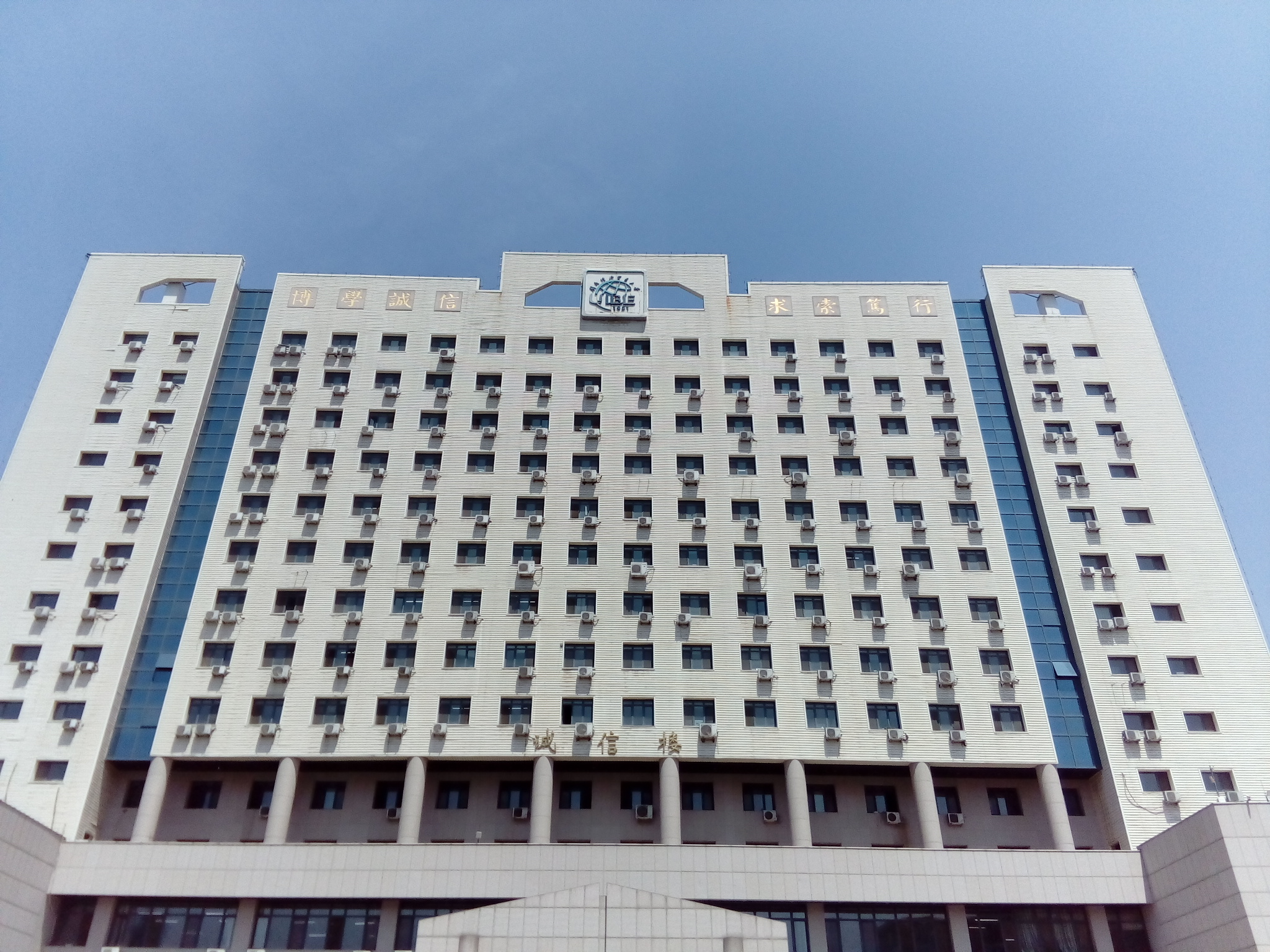 Xin Chen Lou der UIBE Peking